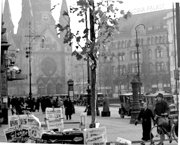 Berlijn. Hardenbergstrasse met de Kaiser-Wilhelm-Gedachtniskirche en de bioscoop Gloria-Palast met autoverkeer en het stalletje van een krantenverkoopster waaronder andere de NSDAP-bladen Der Sturmer en de Volkische Beobachter worden verkocht. Links is nog juist zichtbaar het cafe-restaurant Wilhelmshallen met een aankondiging van een optreden van twee cabaretiers.